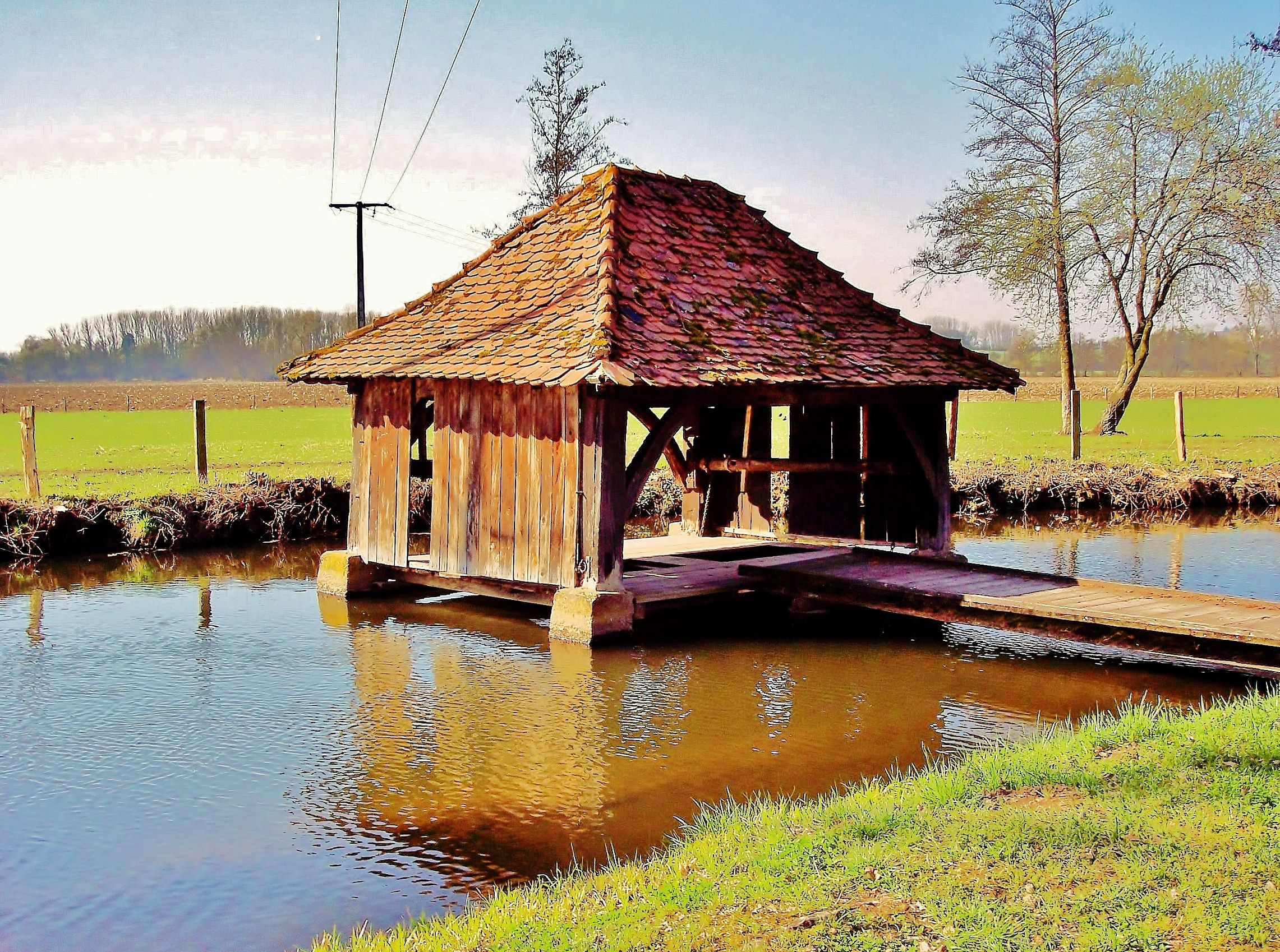 Lavoir au milieu de la rivière Sauer. Gunstett. Bas-Rhin